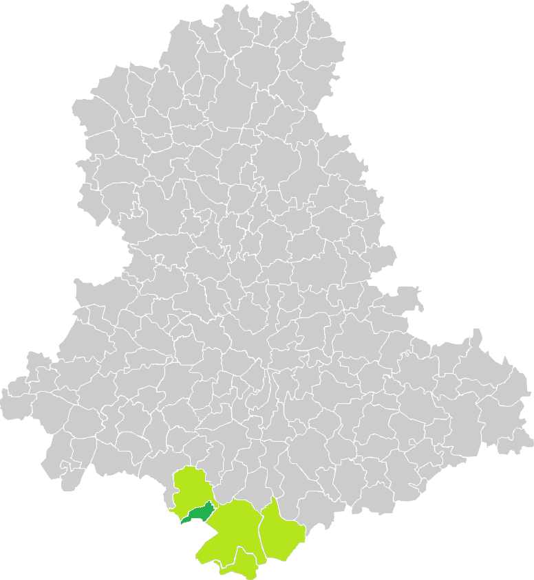 Carte de situation de la commune du Chalard (en vert foncé) dans le votre Canton (en vert clair) sur une carte des communes de la Haute-Vienne